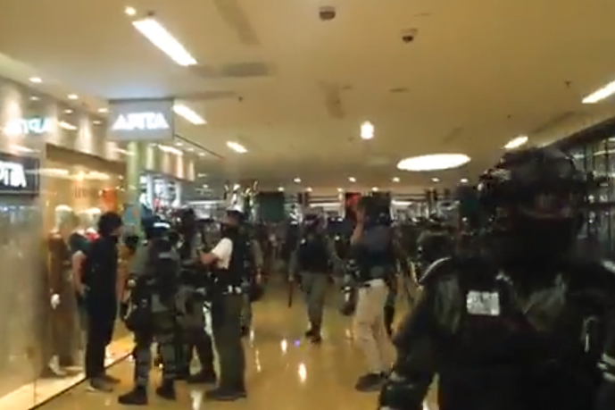 太古城中心爆發警民衝突，再有市民在商場內聚集，要求商場方面回應事件。